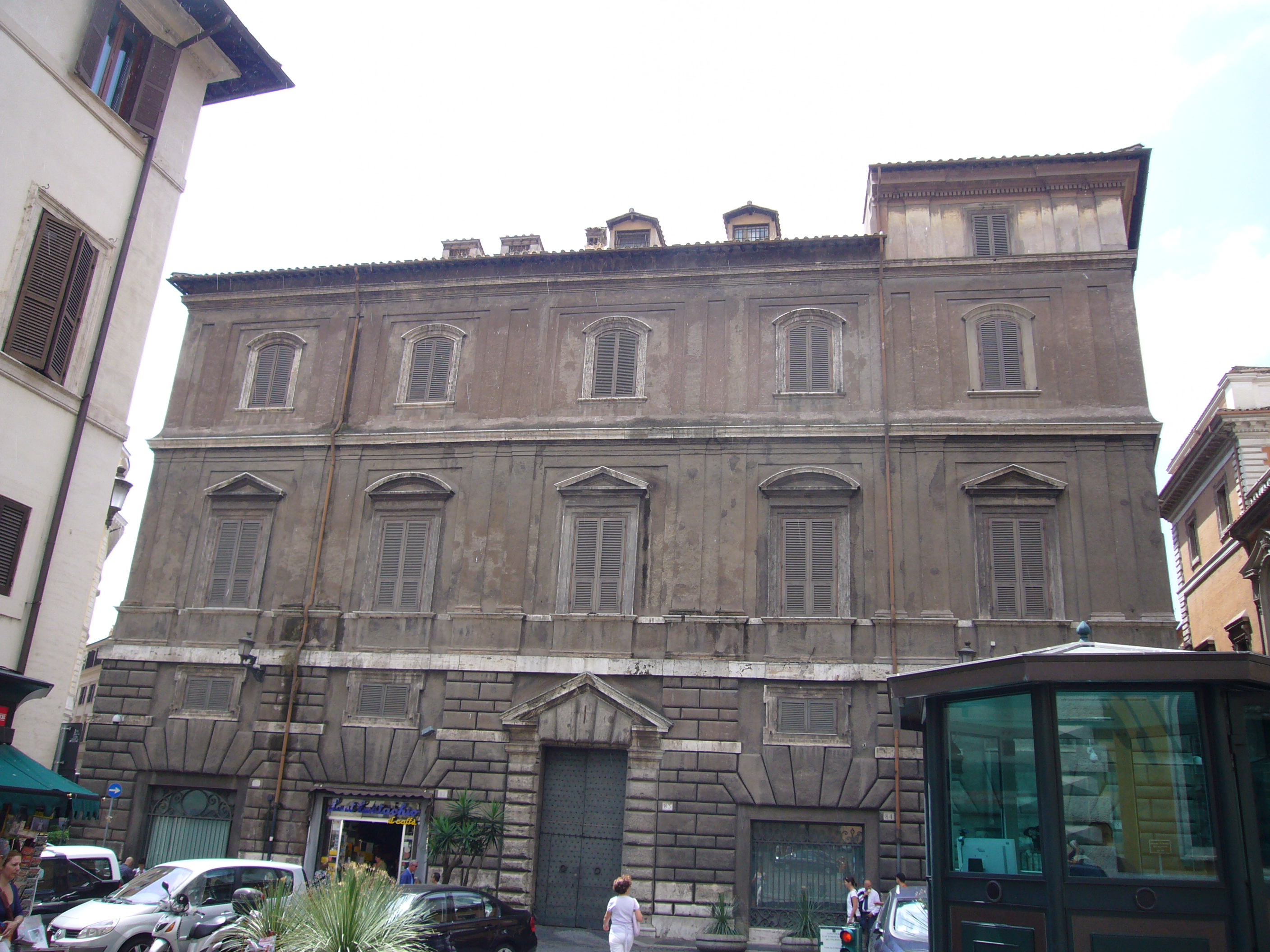 Roma, palazzo Stati Maccarani a Sant'Eustachio